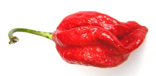 Immagine Naga Viper